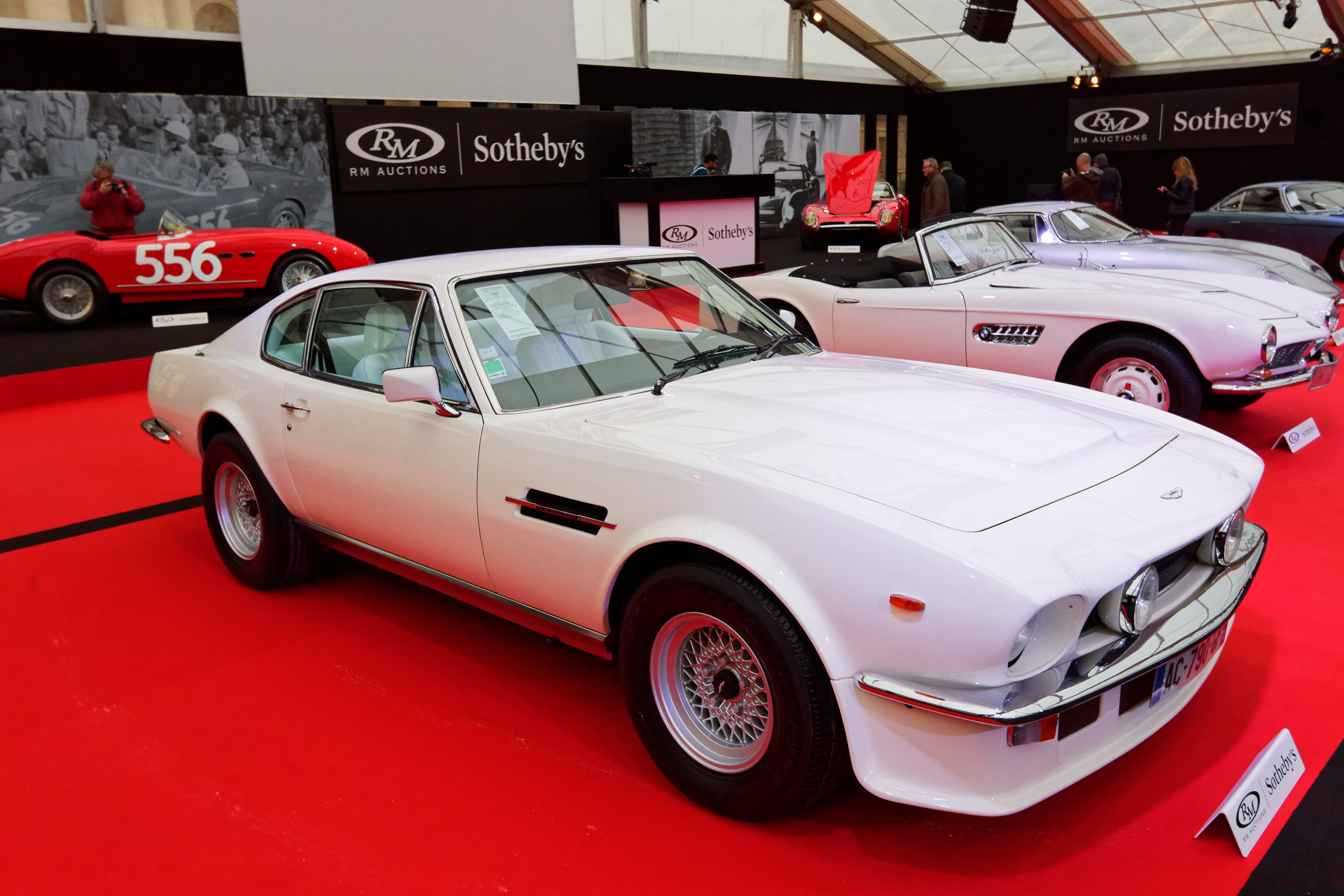 Un véhicule exposé lors de la vente RM Sotheby’s 2018 aux Invalides à Paris.